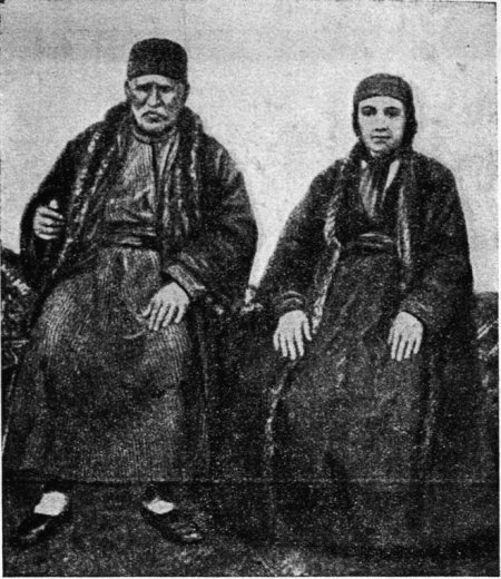 Анастас Робев и жена му